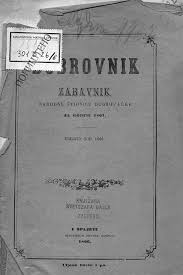 Дубровник забавник